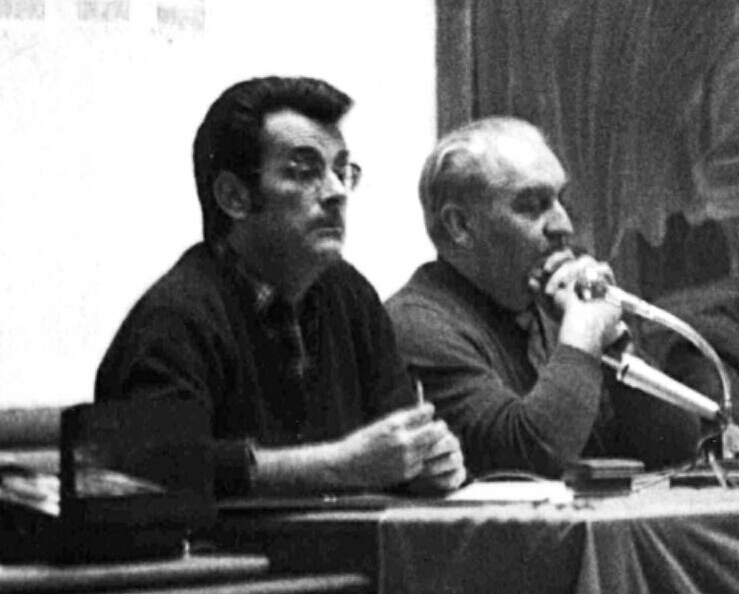 Centre d'étude marxiste de Pierre Broué (lunettes) et Paul Duthel (au centre) sur la Révolution allemande.